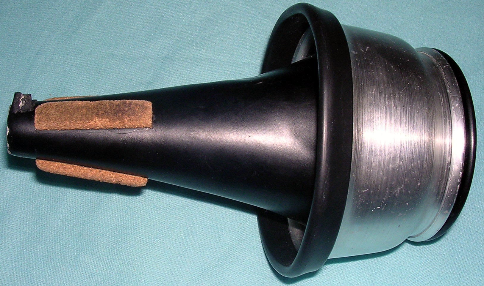 עמעם של he:חצוצרה.